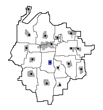 Lagekarte von Köchingen in der Gemeinde Vechelde